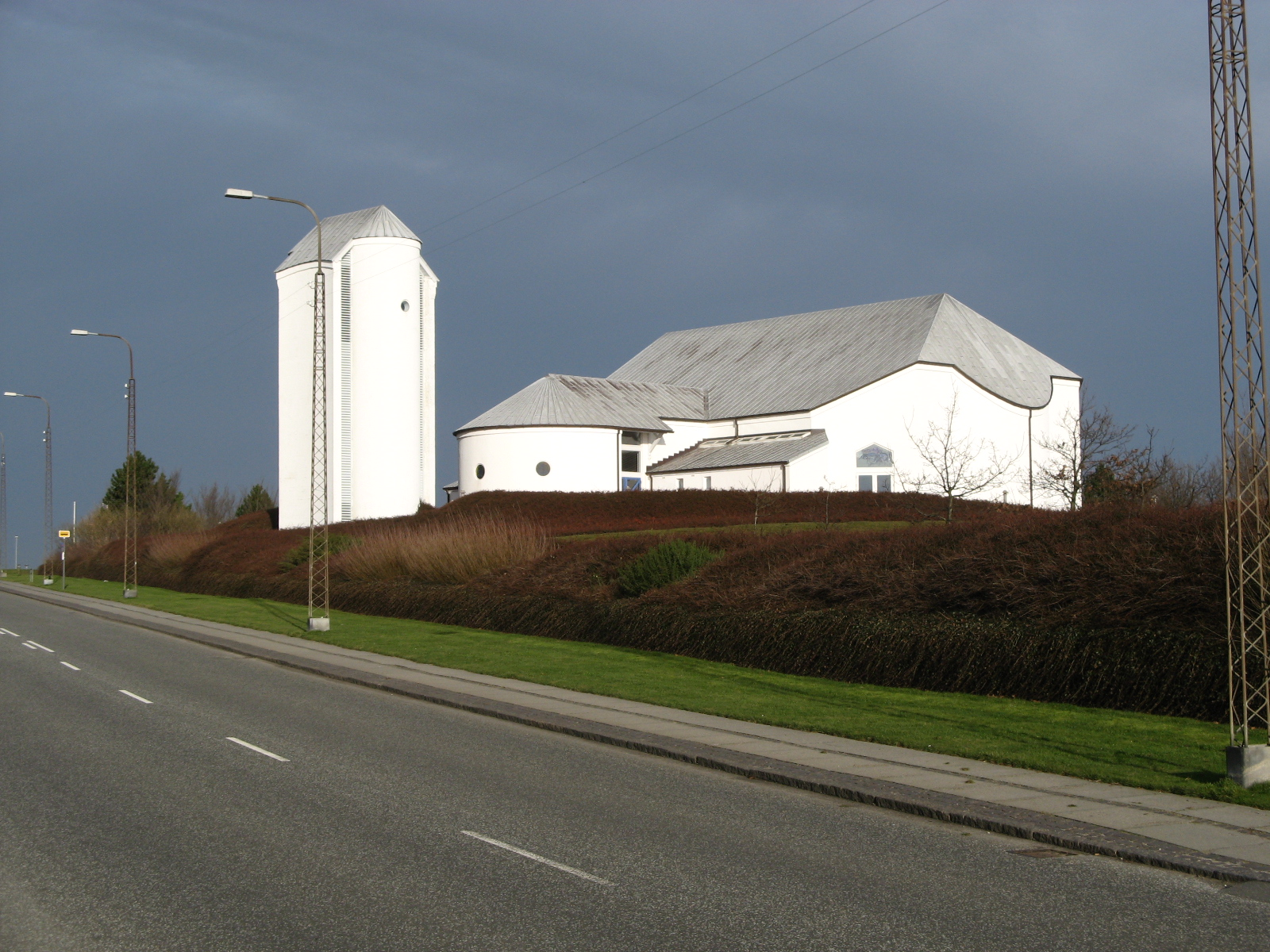 Hjerting Kirke, Hjerting sogn, Esbjerg kommune (former: Skads Herred, Ribe Amt). Kirken set fra nordvest